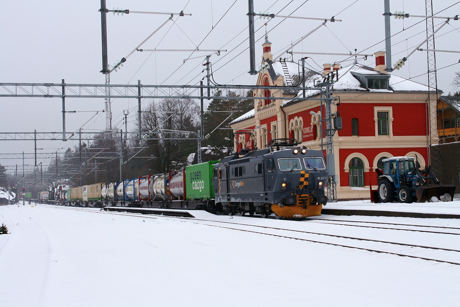 Godstog passerer Kornsjø stasjon